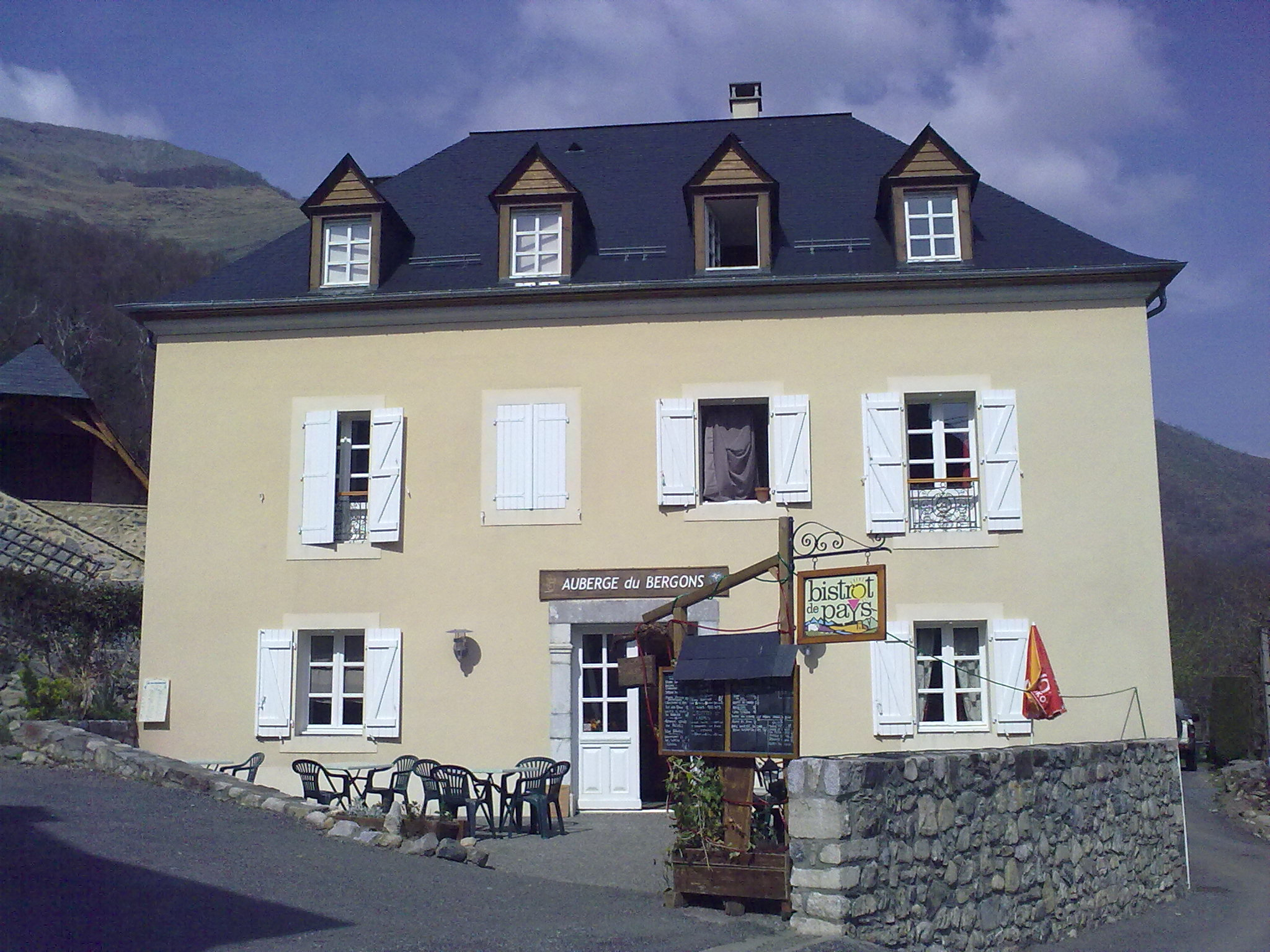 Salles (Hautes-Pyrénées, France) - L'unique bar-restaurant.